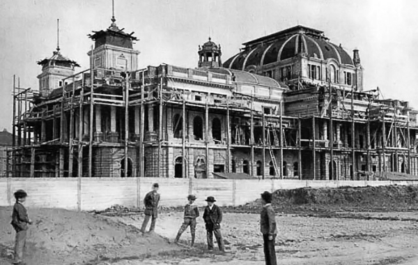 Izgradnja Hrvatskog narodnog kazališta 1894. godine